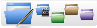 Extrait des icônes de l'Oxygen Project